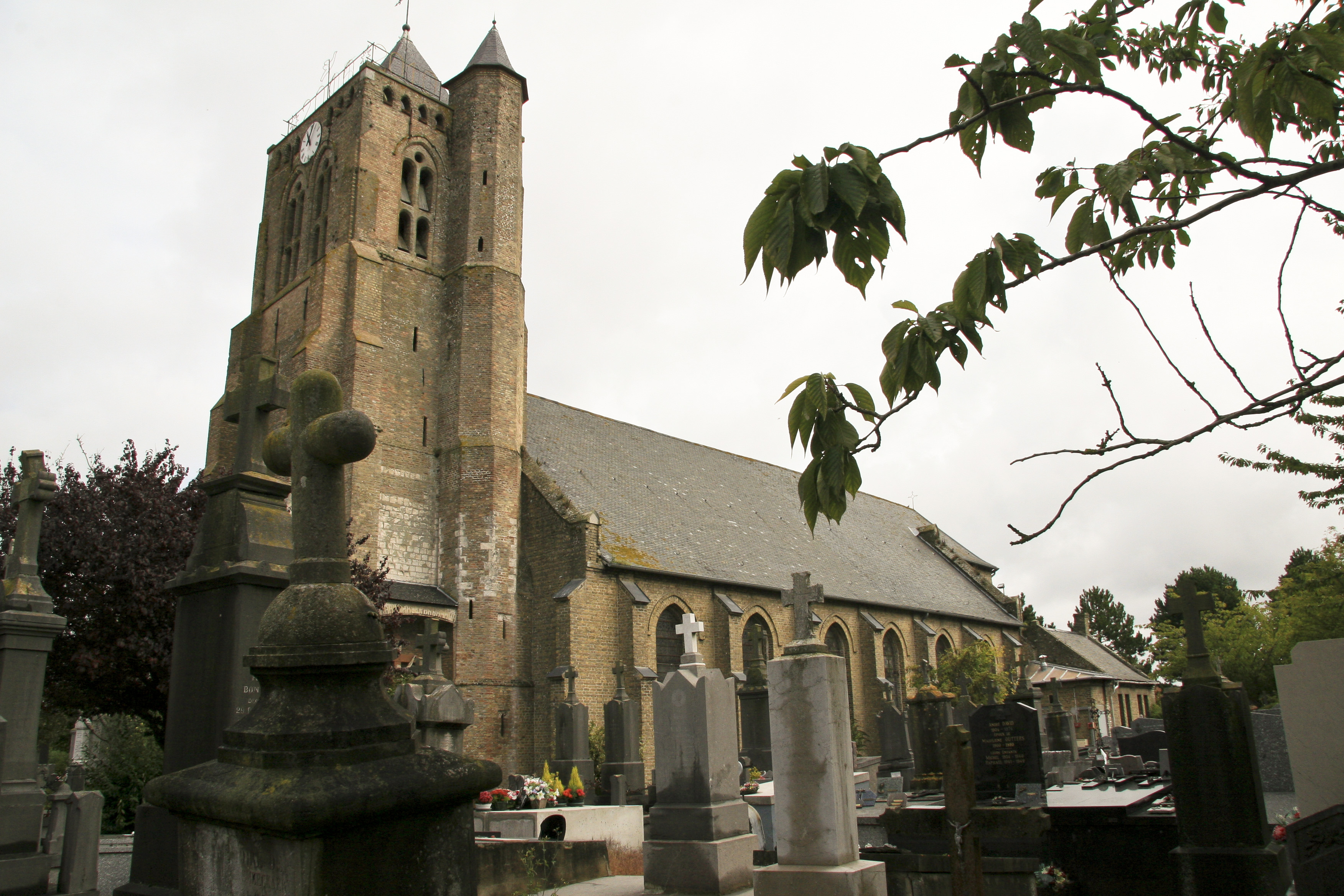 l'église St Omer de Brouckerque